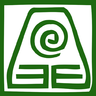 Emblema del reino tierra de Avatar